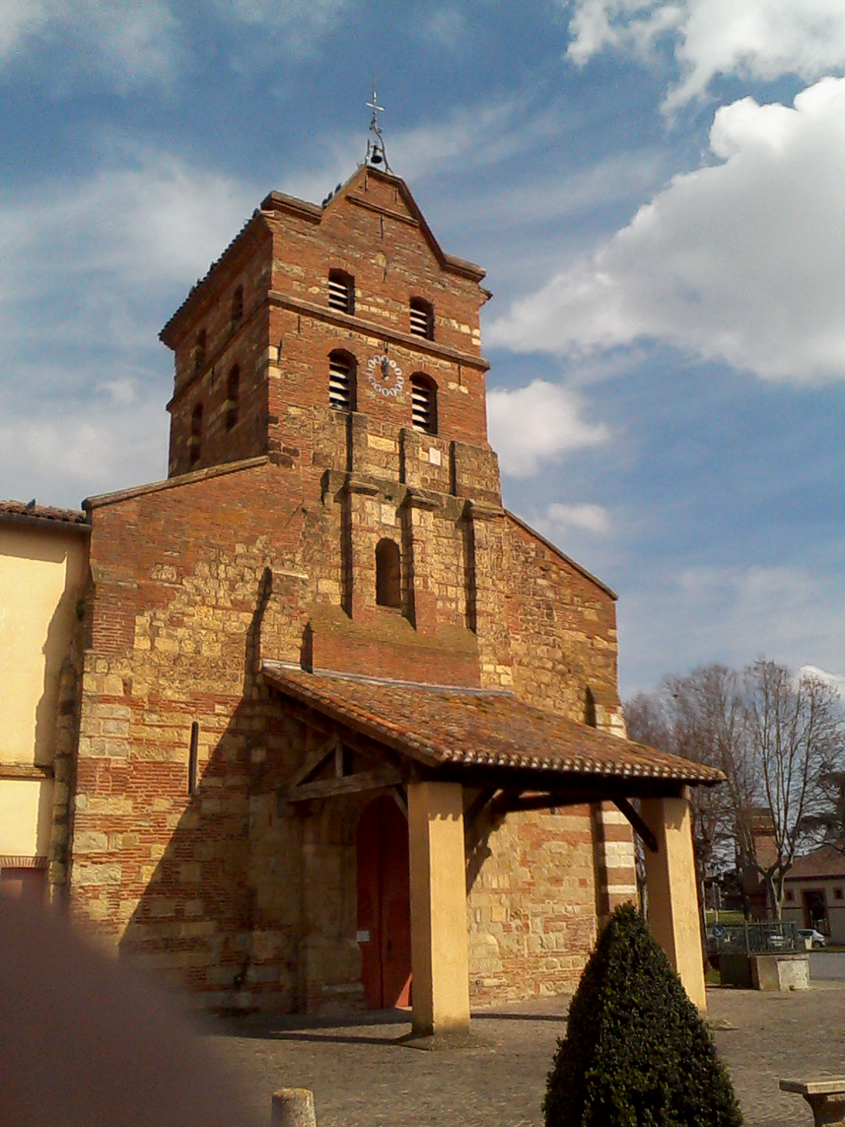 Église de Lavernose-Lacasse